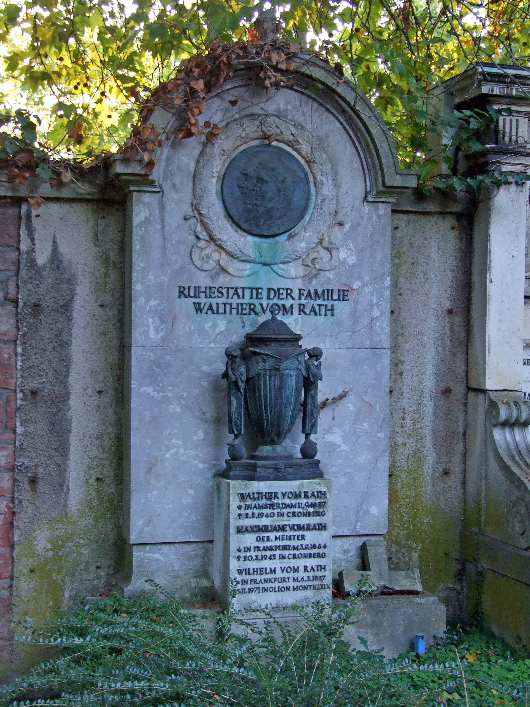 Walther vom Rath Familien-Grabstelle auf dem Hauptfriedhof in Ffm